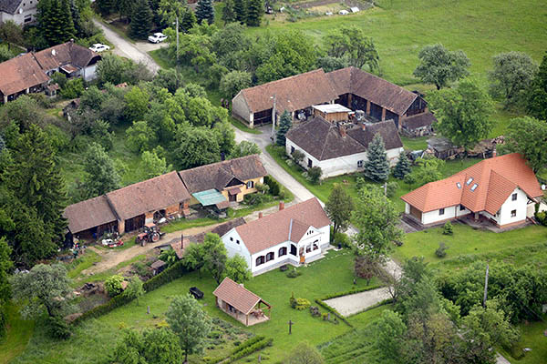 Légi fotó